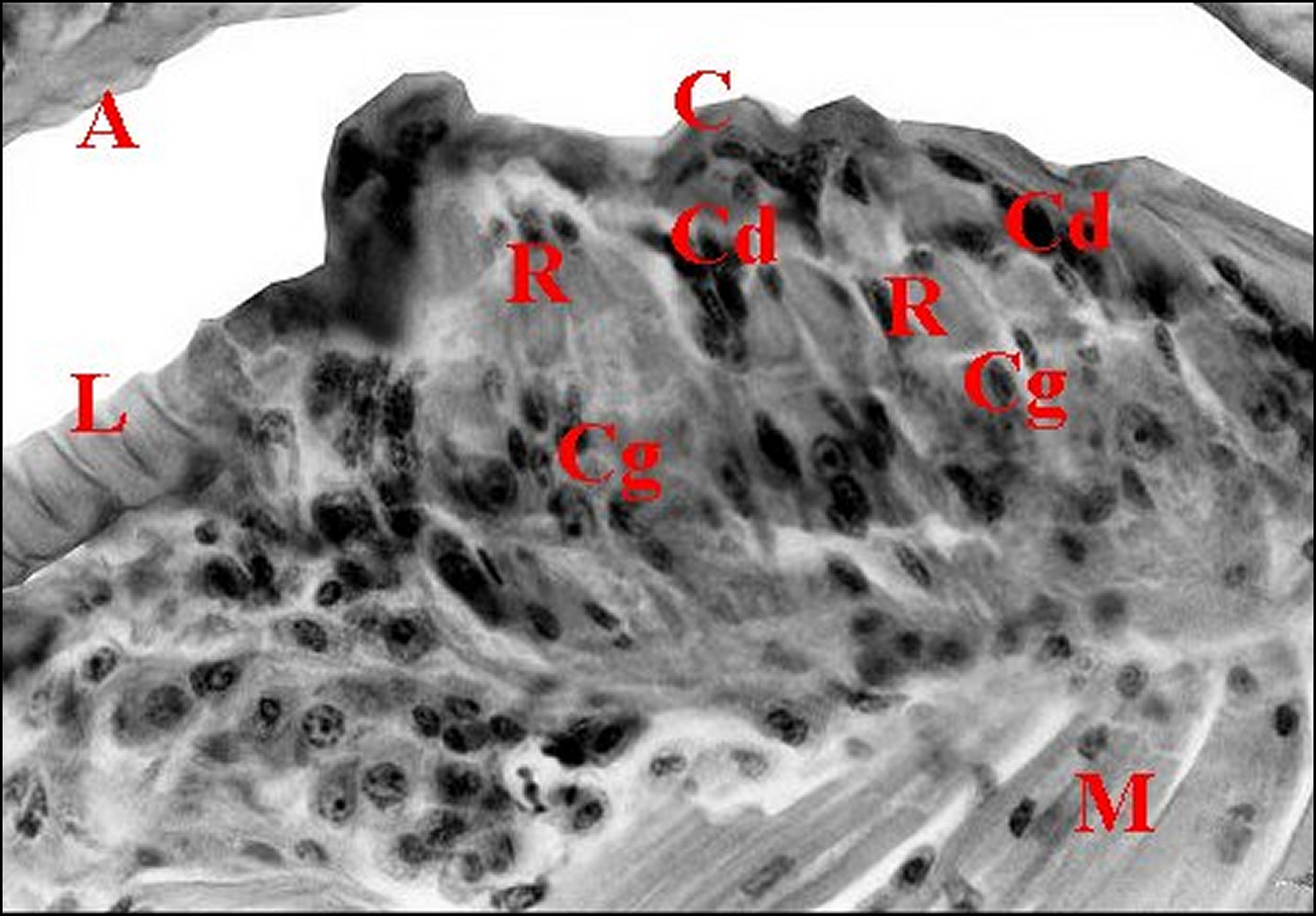 Glande antéro-dorsale et organe en bourrelet d'un pédicule de Meta, coupe histologique